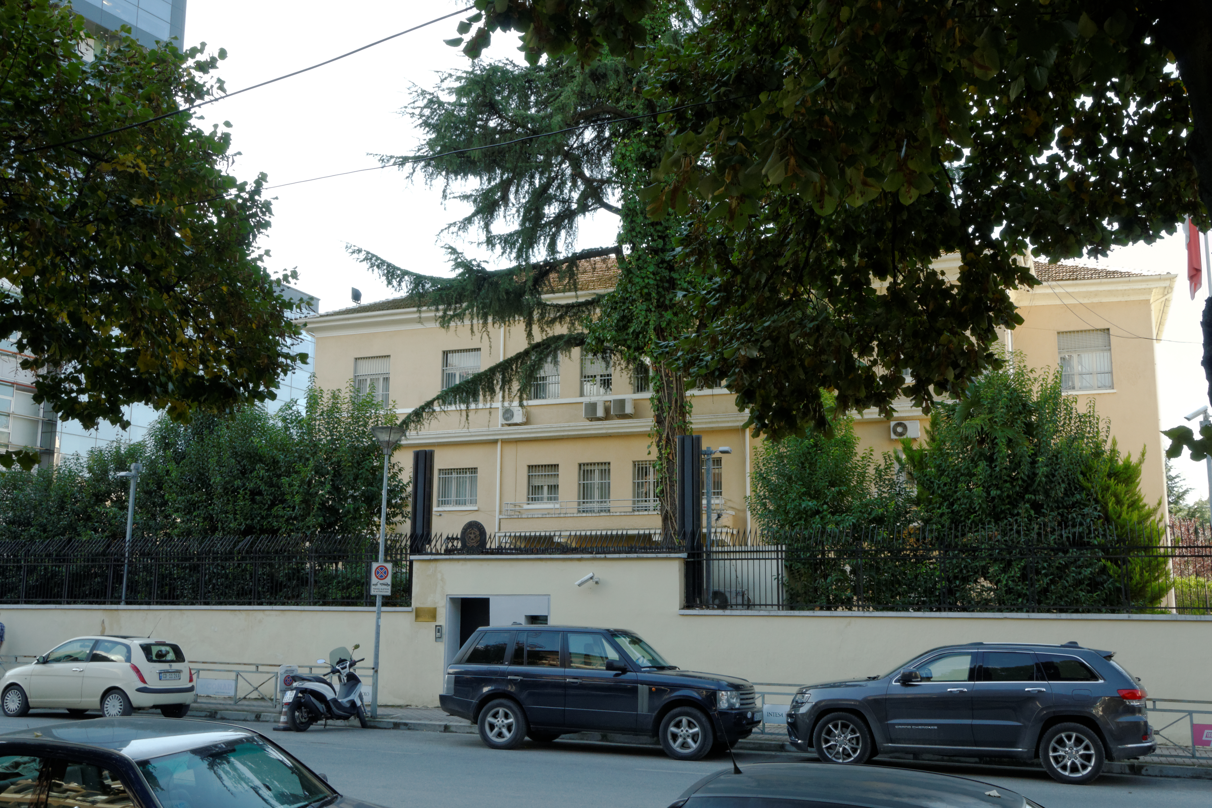 Ambasada Italiane, Ambasada Italiane në Tiranë. Italian Embassy in Tirana. Ambasciata d'Italia a Tirana. Foto by Dritan Mardodaj.